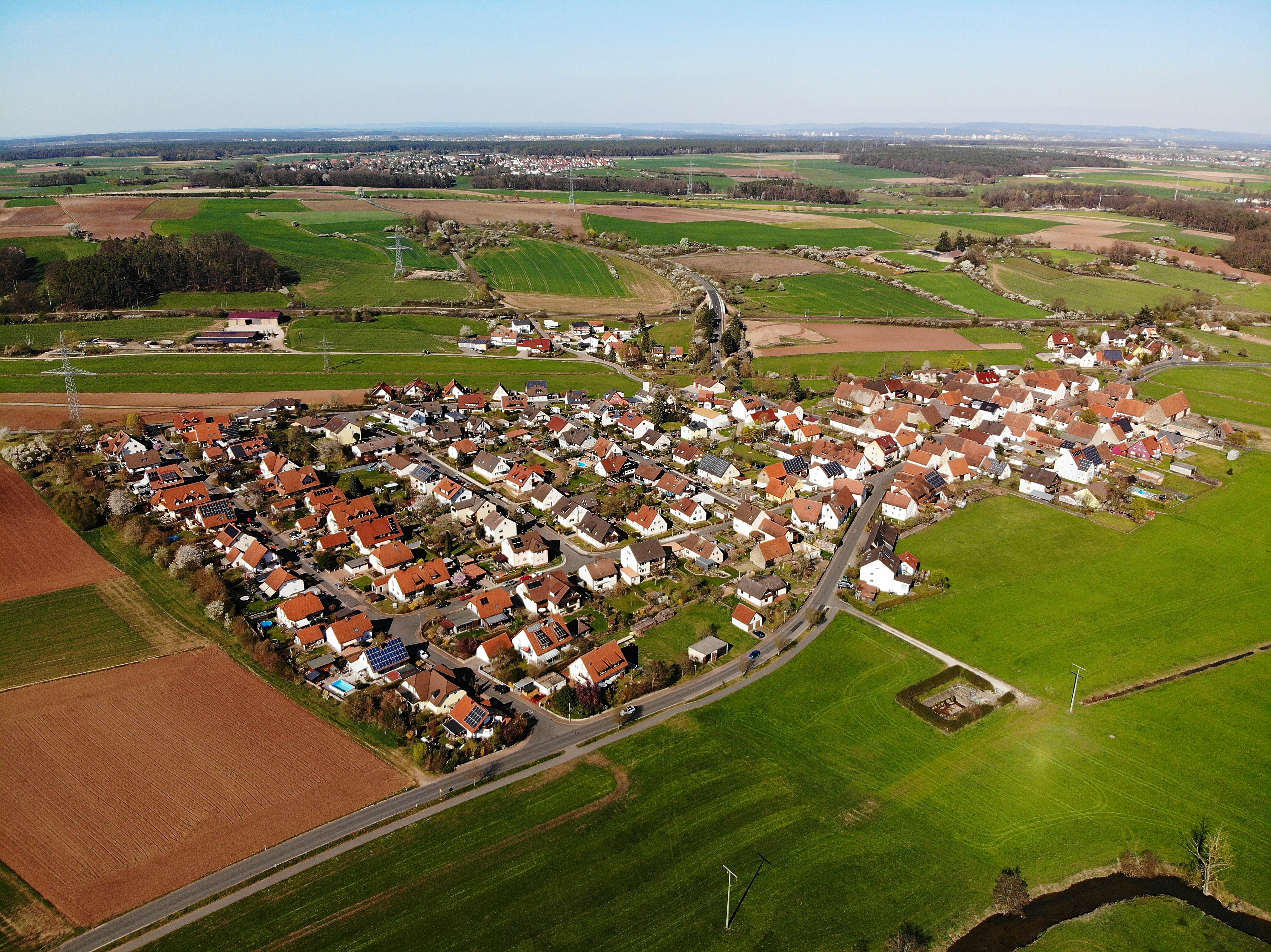 Retzelfembach (Veitsbronn) Luftaufnahme (2020)